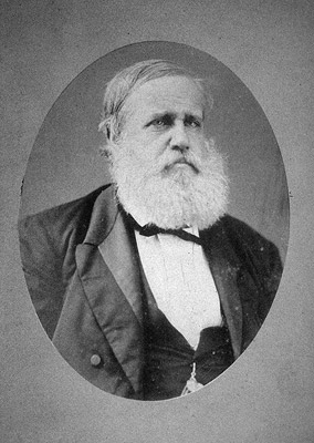 Azevedo, Militão Augusto de D. Pedro II , ca. 1870 albúmen Acervo do Museu Paulista (São Paulo, SP)